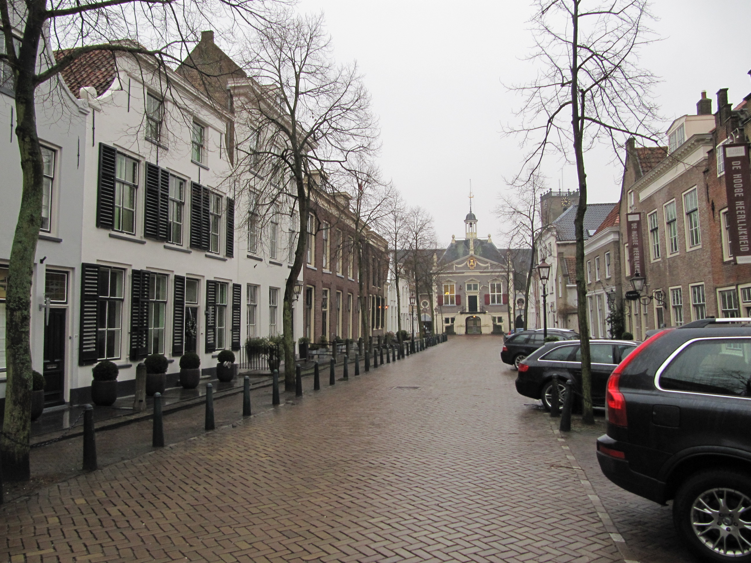 Zicht op een deel van de Voorstraat in Middelharnis jpg